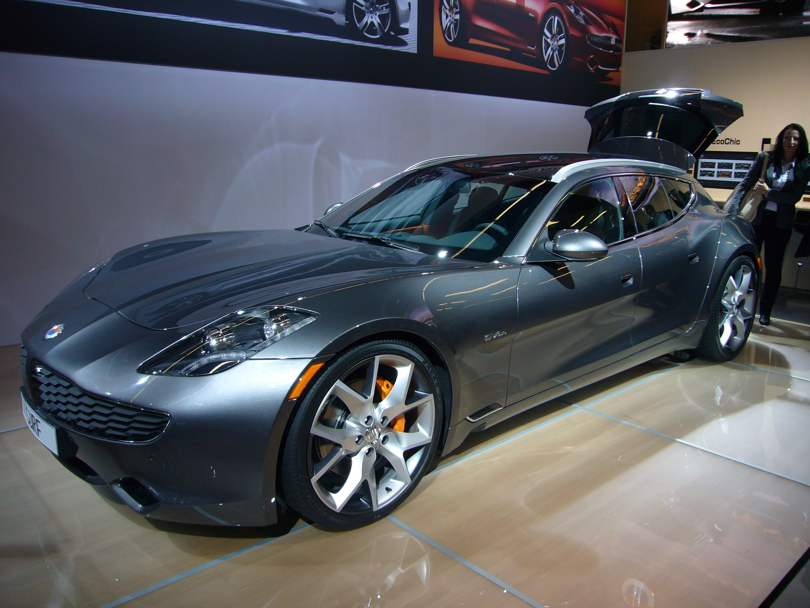 IAA Frankfurt 2011